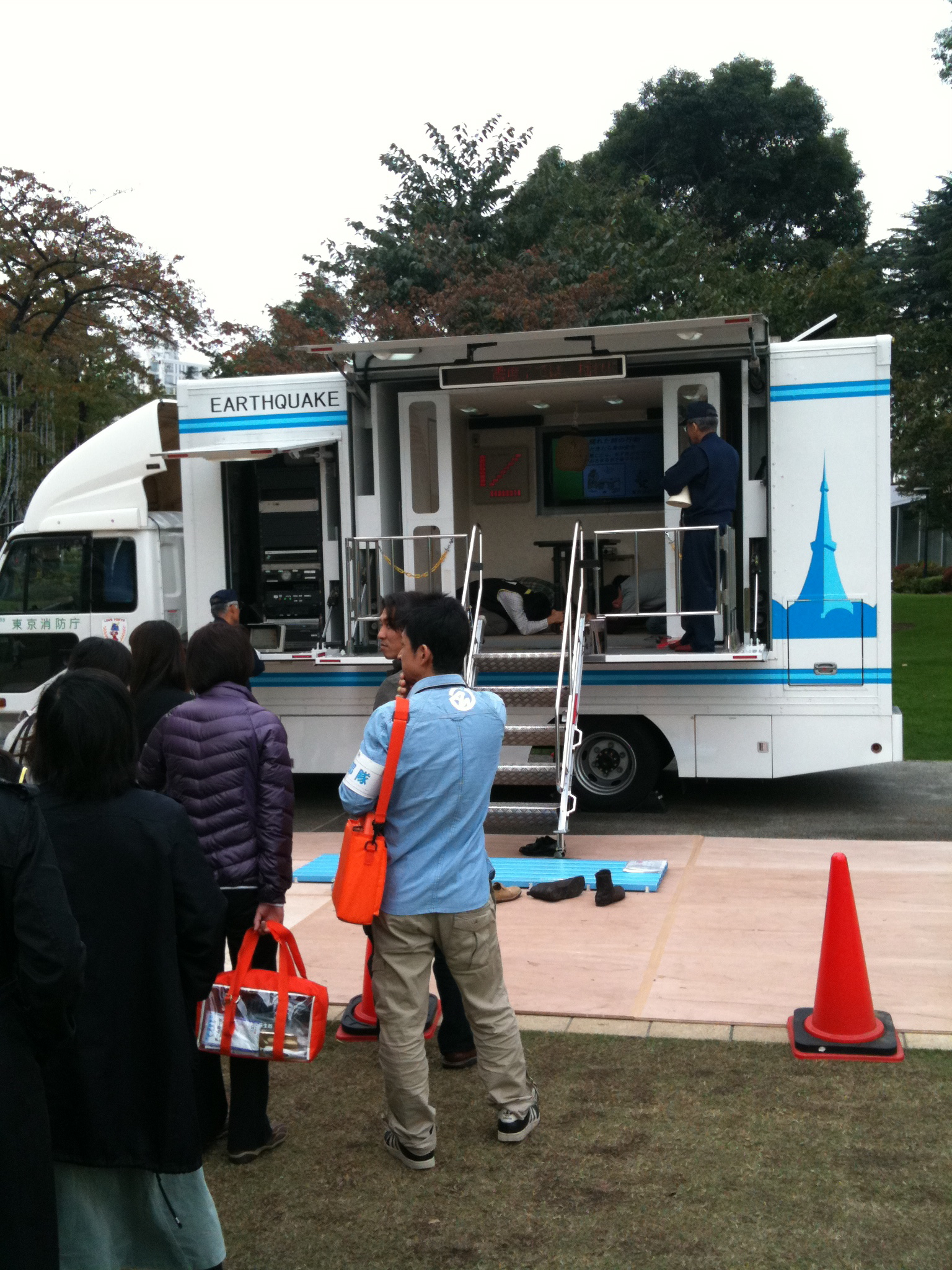 東京ミッドタウンで避難訓練2009秋